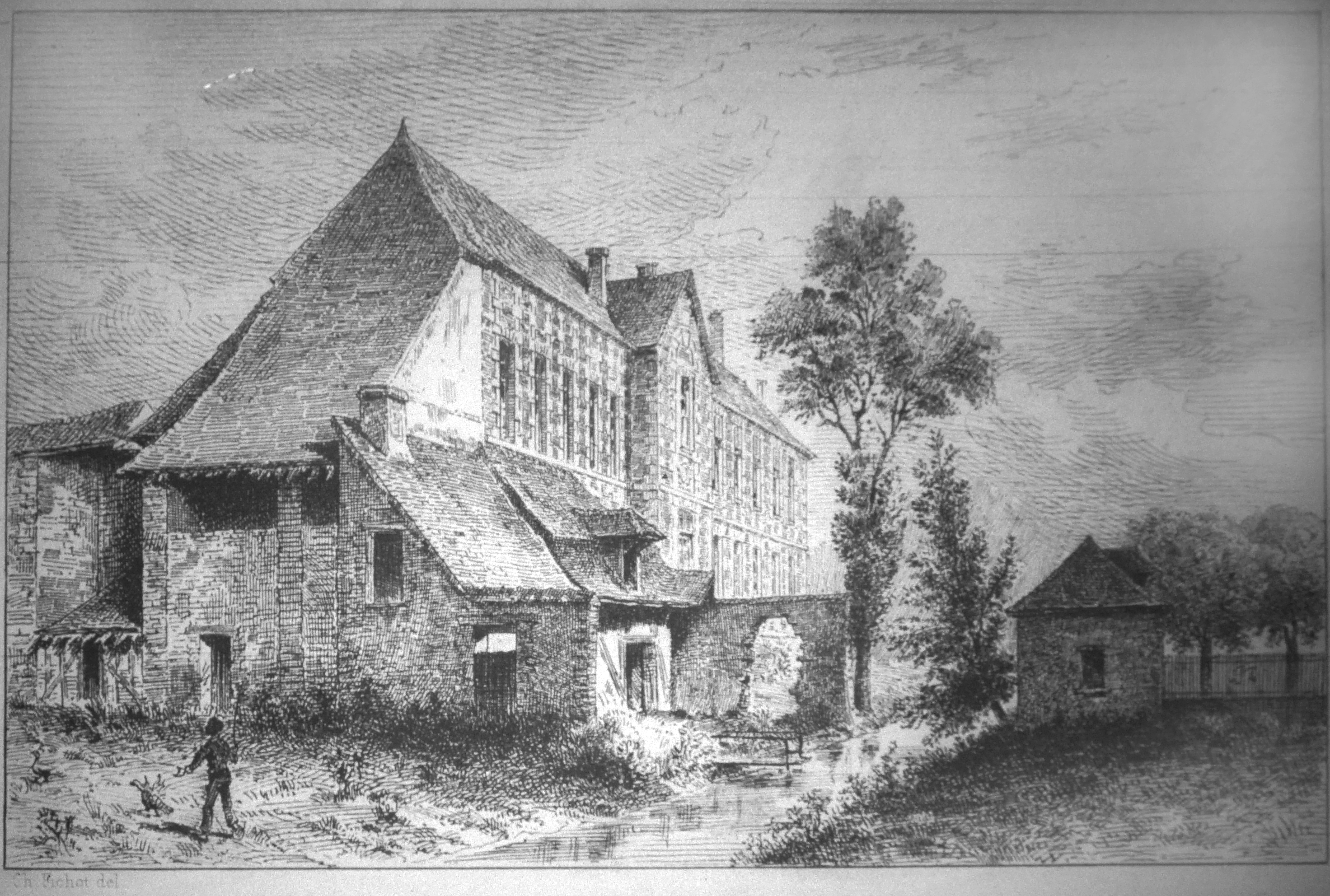 dessin de l'abbaye de montiéramey par Fichot